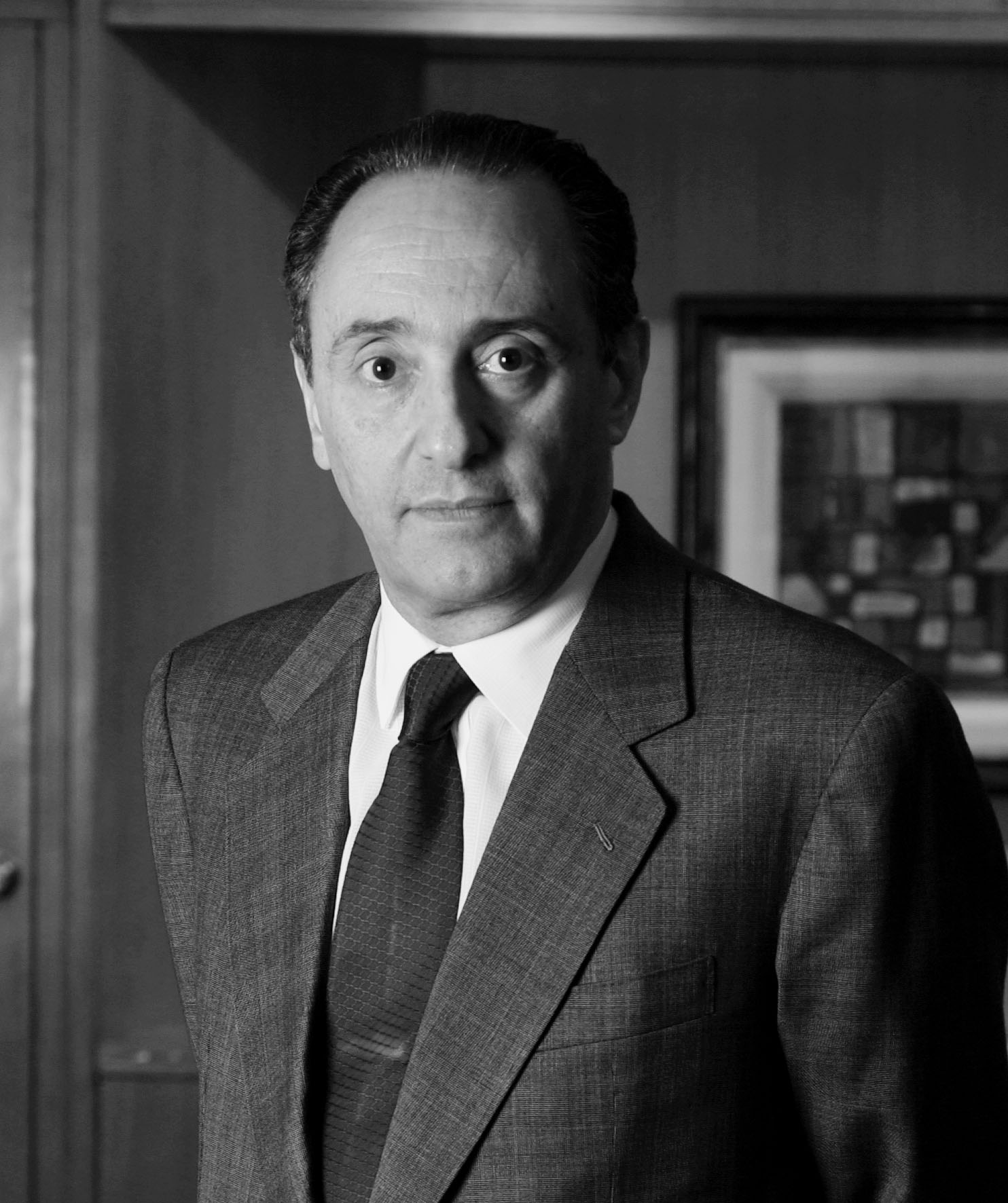 Principal accionista del Grupo Clarín